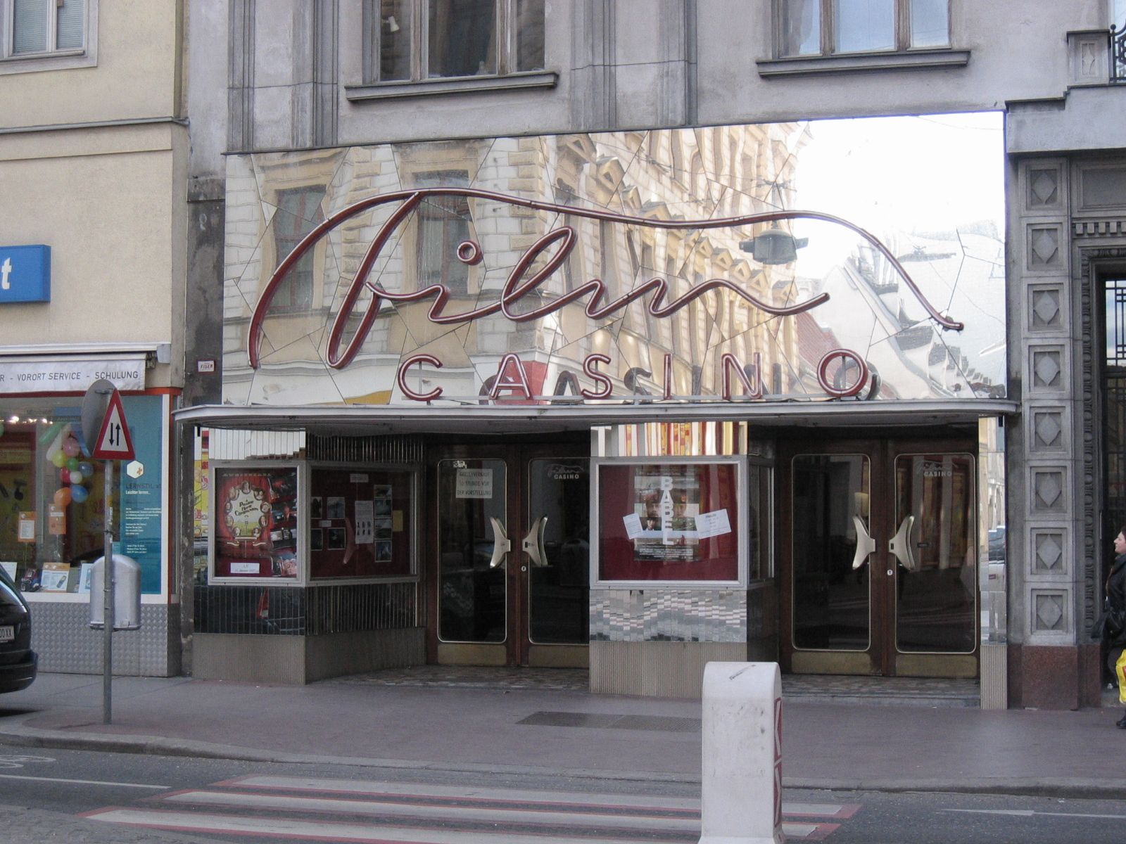 Filmcasino Entree